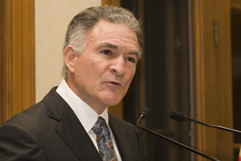 Presidente de la Fundación Libertad y Desarrollo en Guatemala